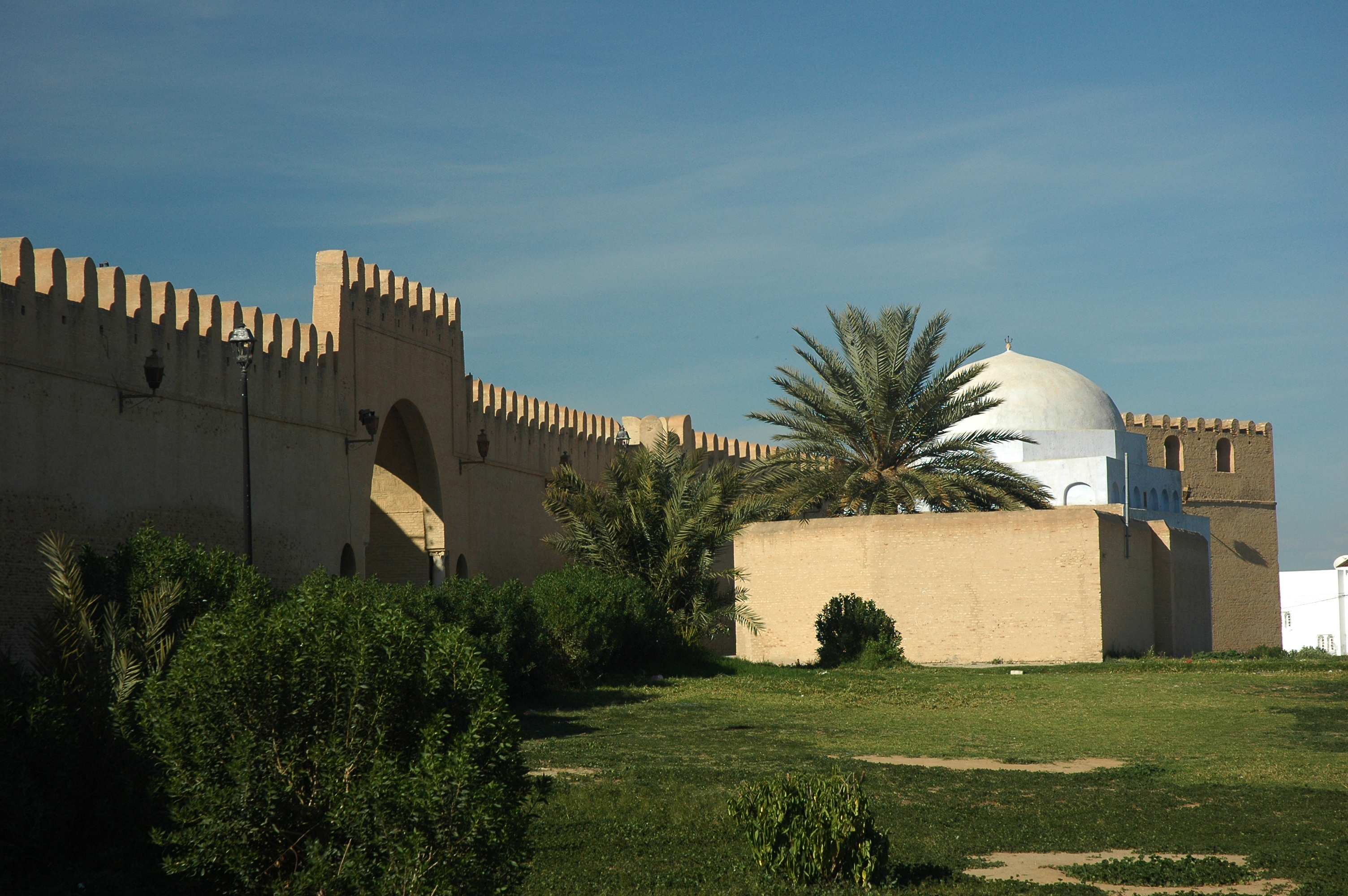 Kairouan Tunisie